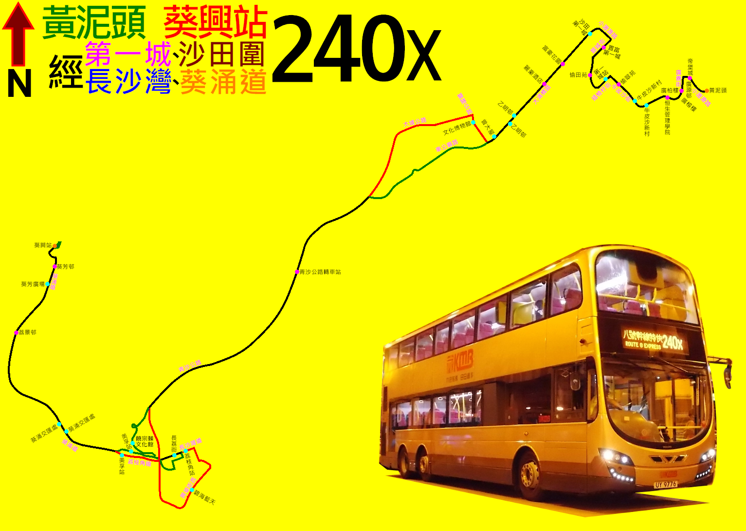 中文（香港）: 九巴240X線的走線圖